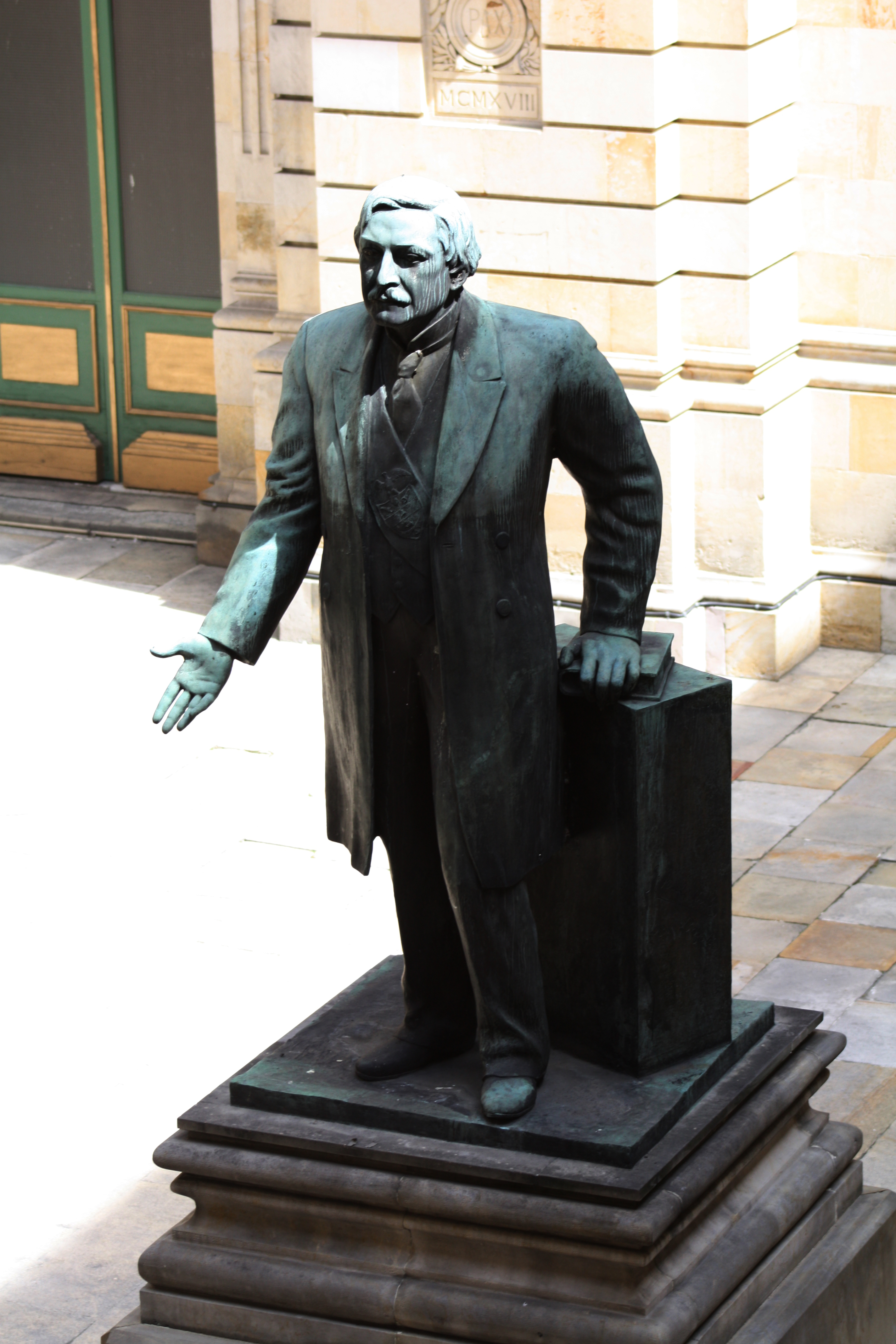 Presidente José Vicente Concha, 1933